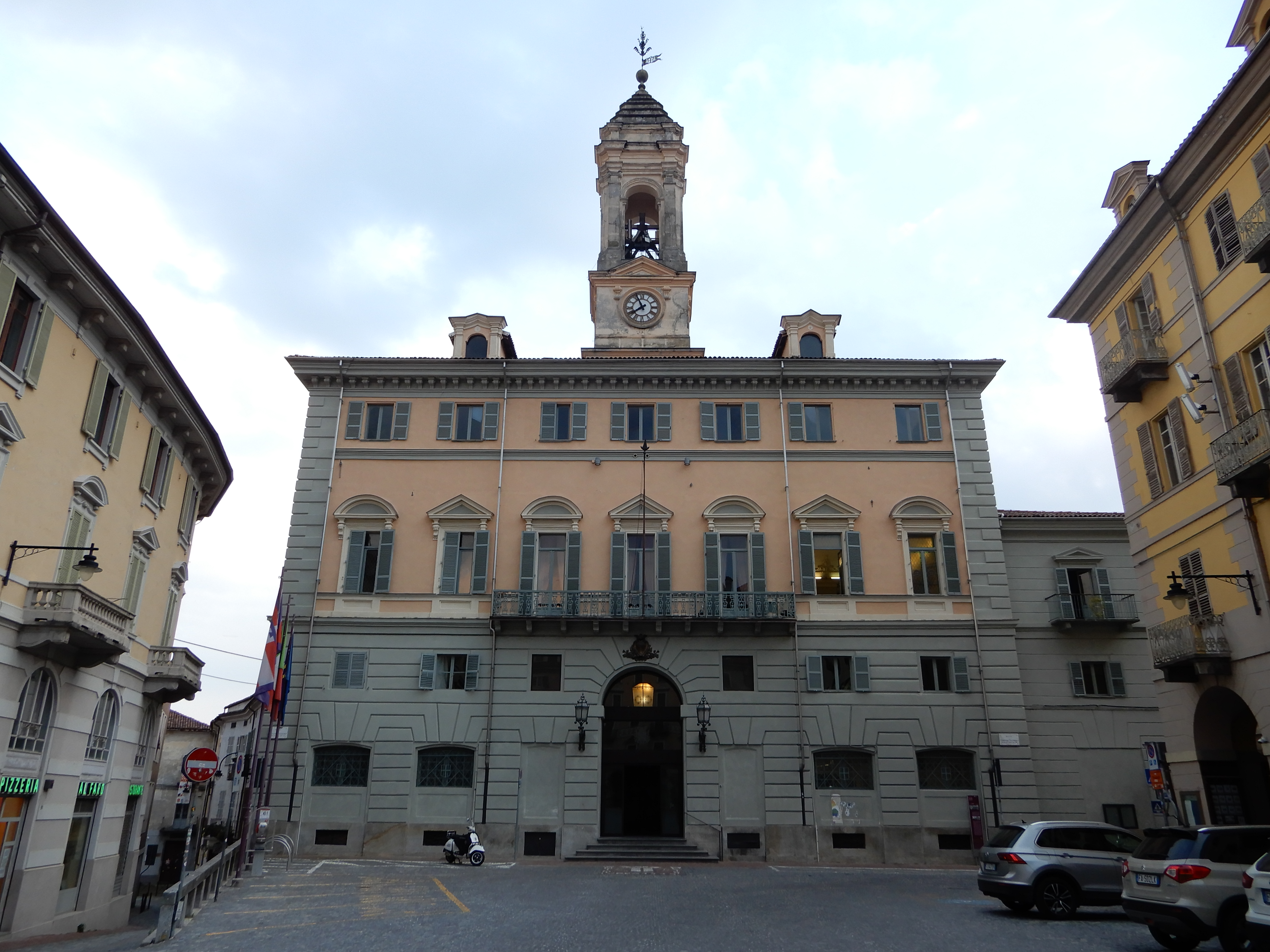 Veduta del Palazzo di Città di Ivrea